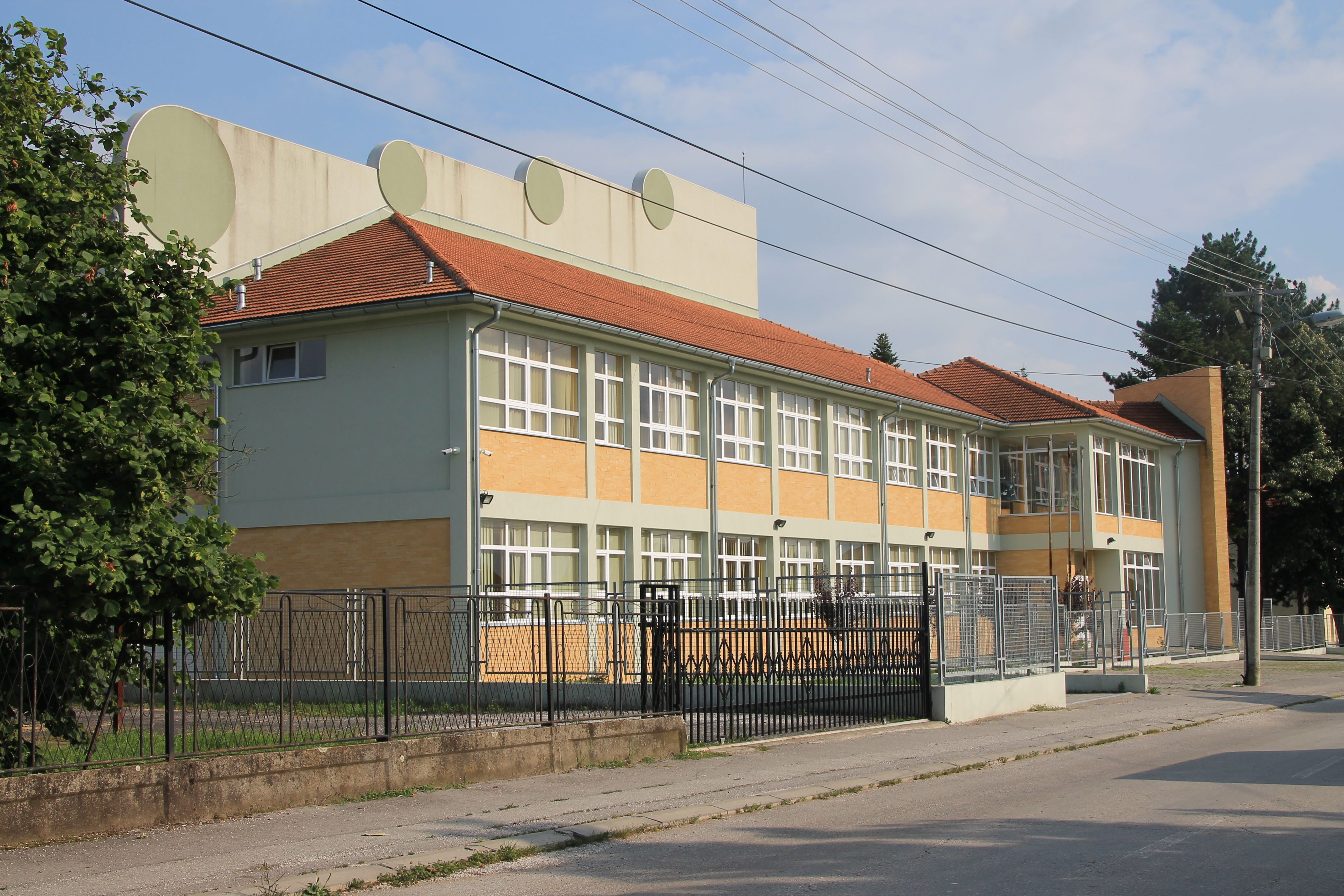 Osnovna škola u Mrčajevcima